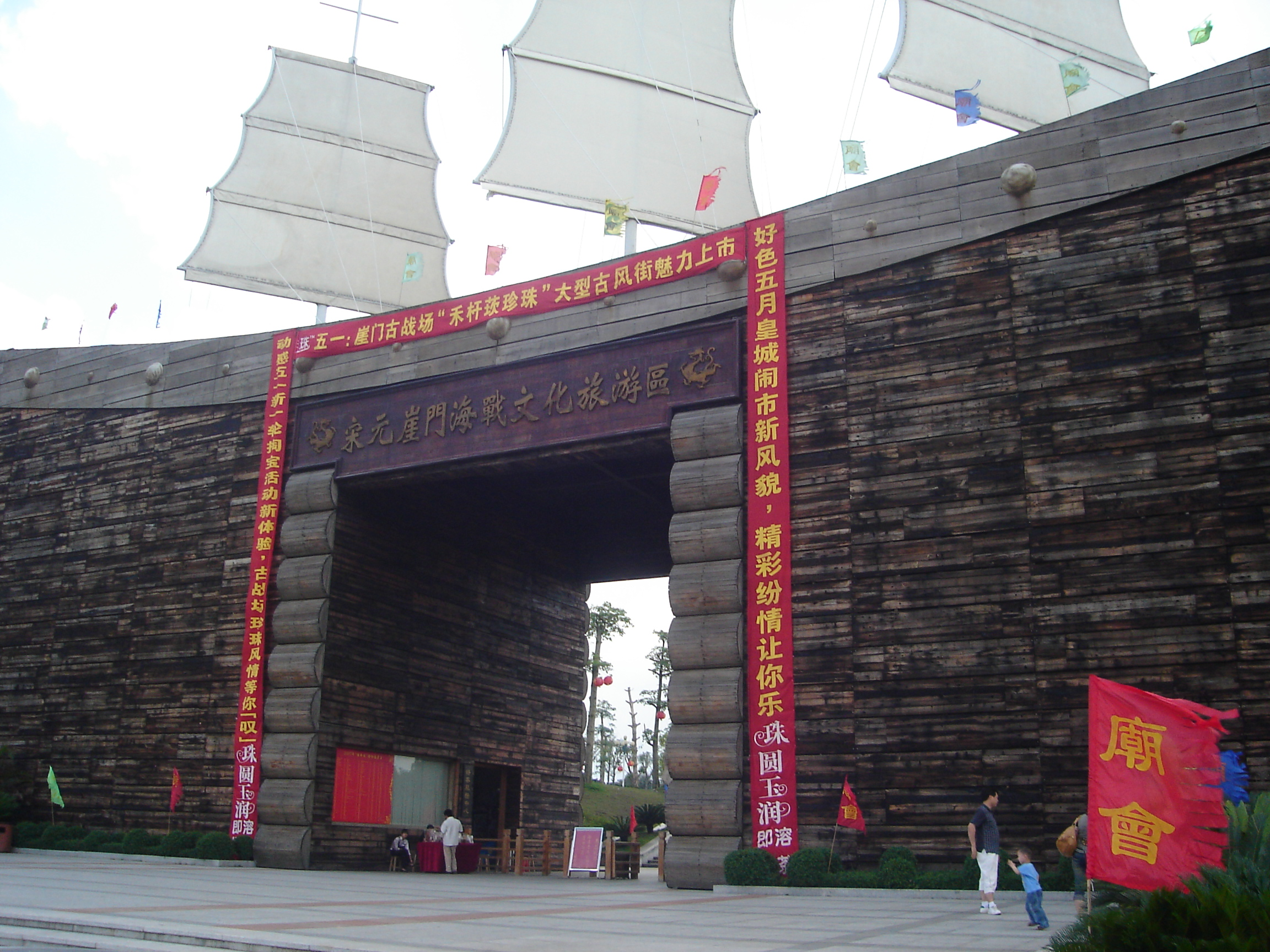 江门市新会区宋元崖门海战文化旅游区